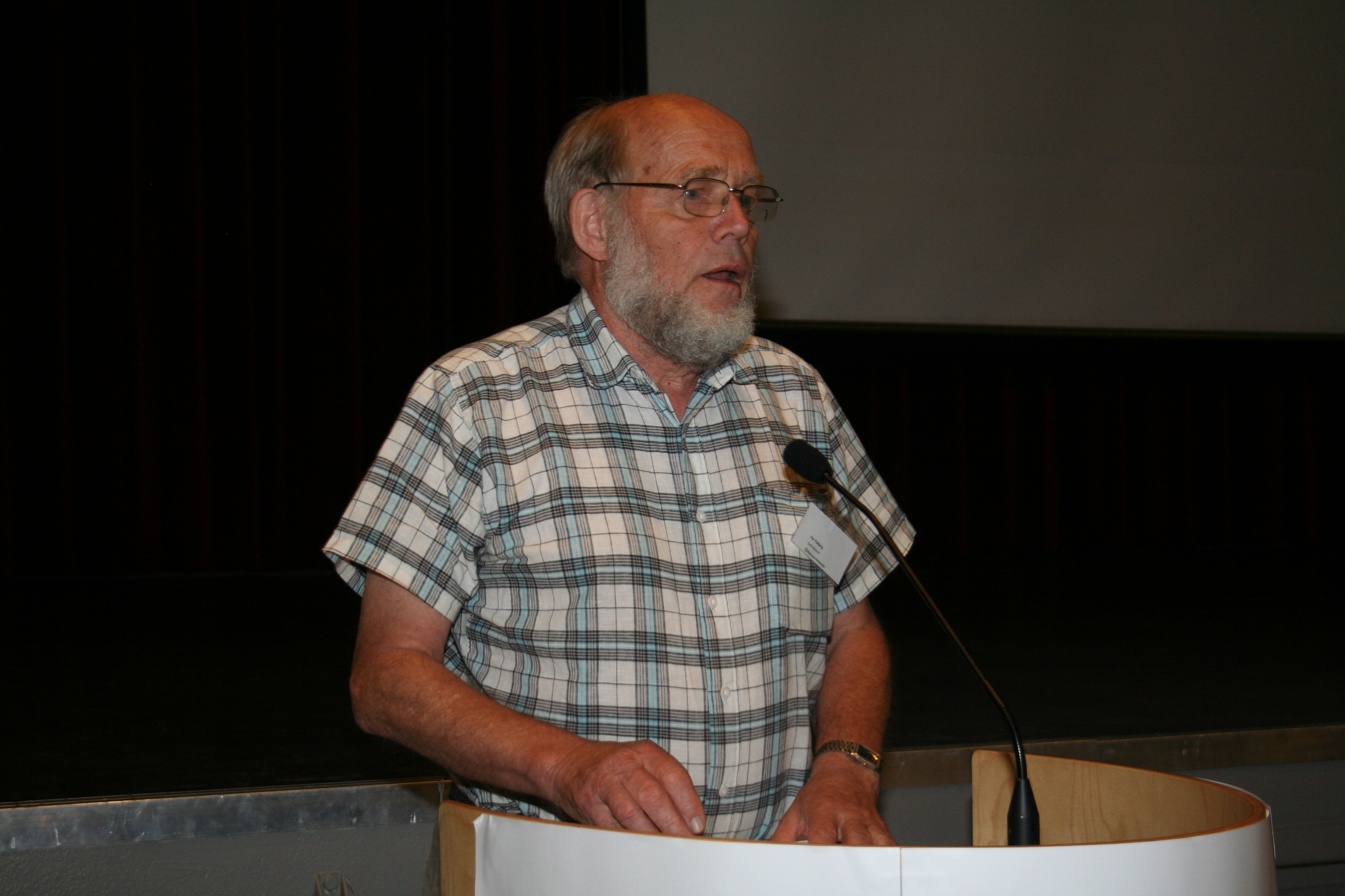 per-flatberg